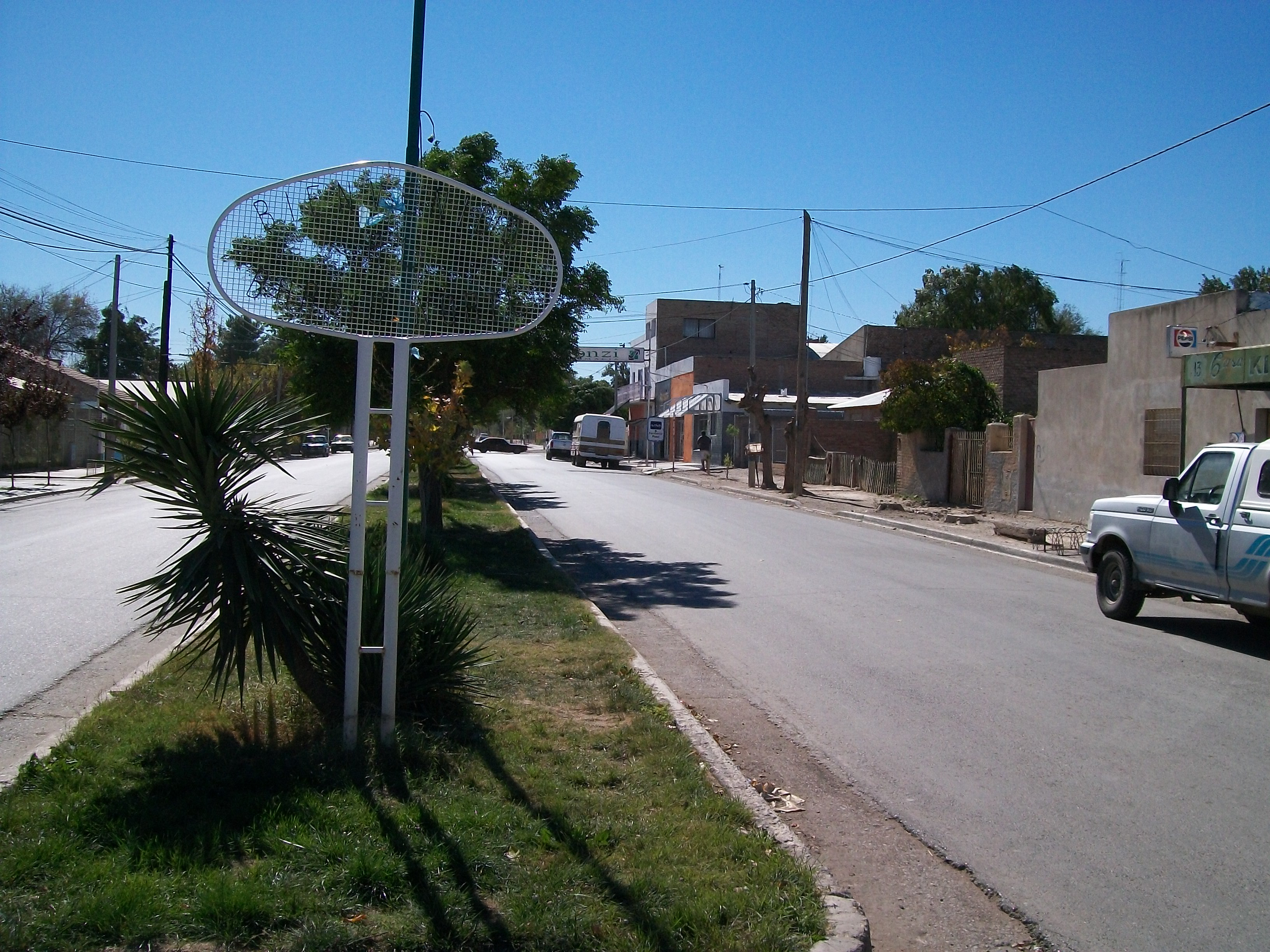 Avenida Perito Moreno, ingreso al barrio Norte de la localidad de Allen, provincia de Río Nergo, Argentina.